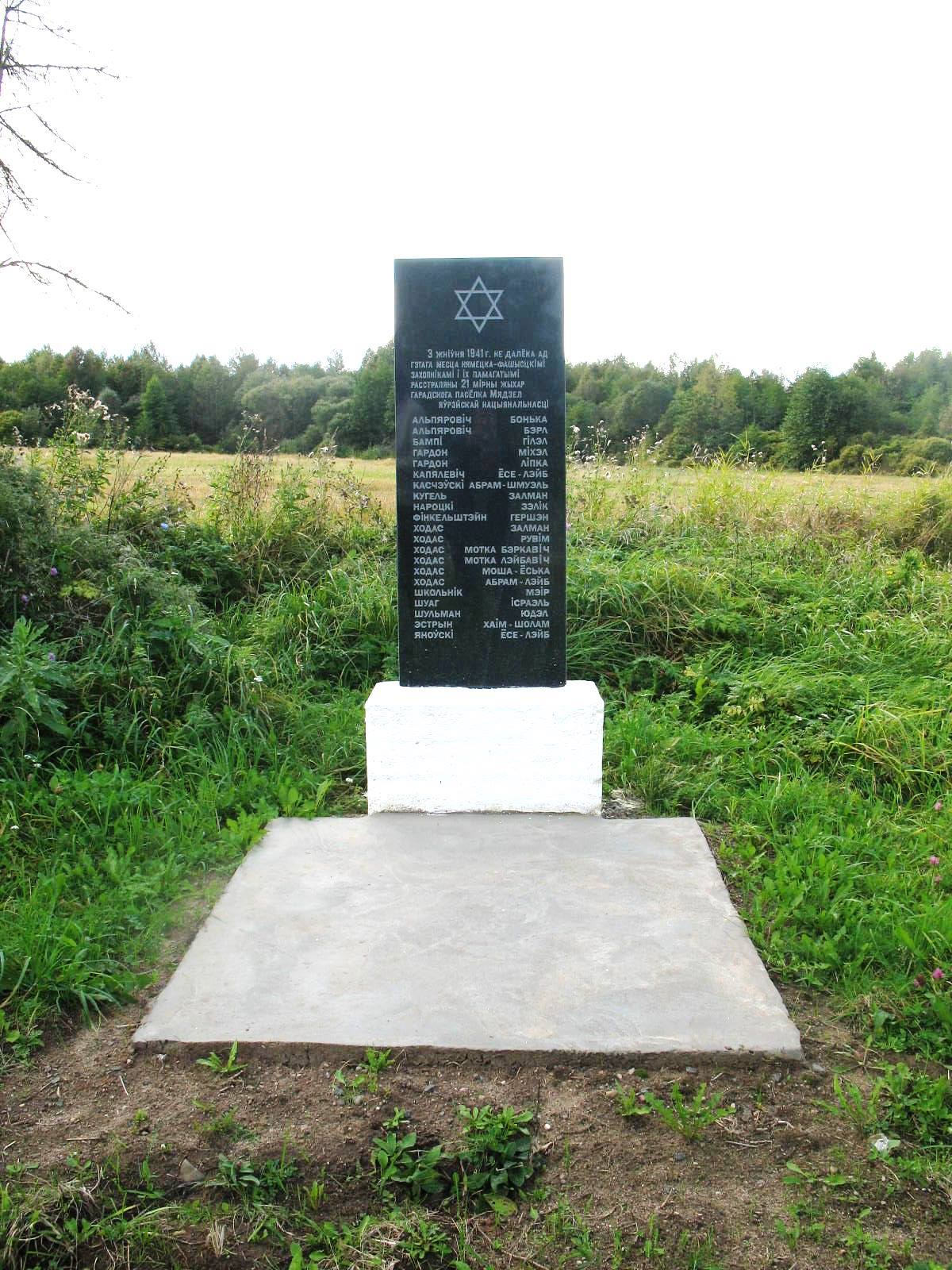 Памятник евреям города Мядель Минской области, убитым в сентябре 1941 года в урочище Мхи. Находится у дороги Минск-Нарочь за 200 метров до знака «Мядзель» с левой стороны дороги. Установлен израильтянами - потомками убитых.